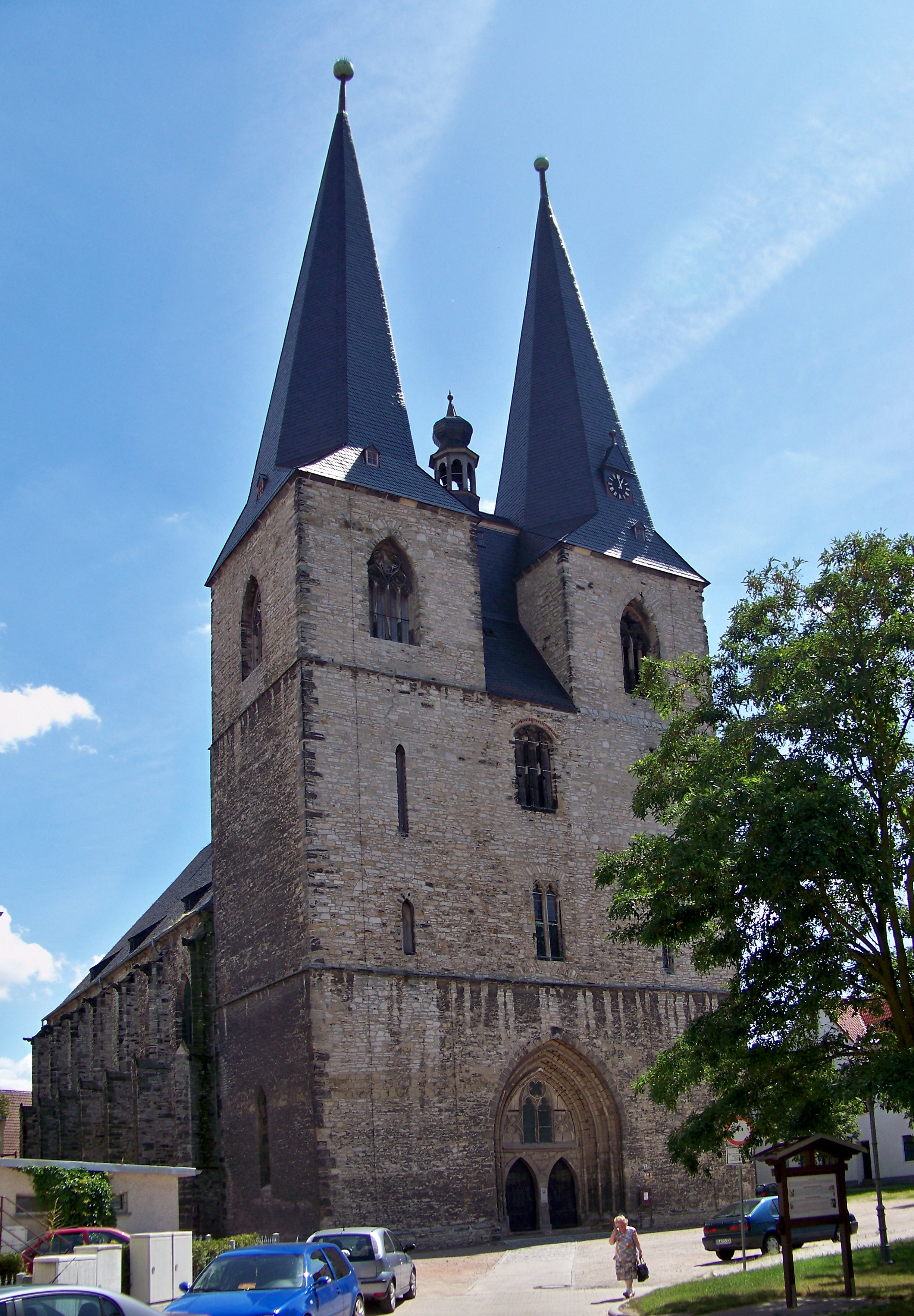 St.-Stephani-Kirche in Calbe (Saale)